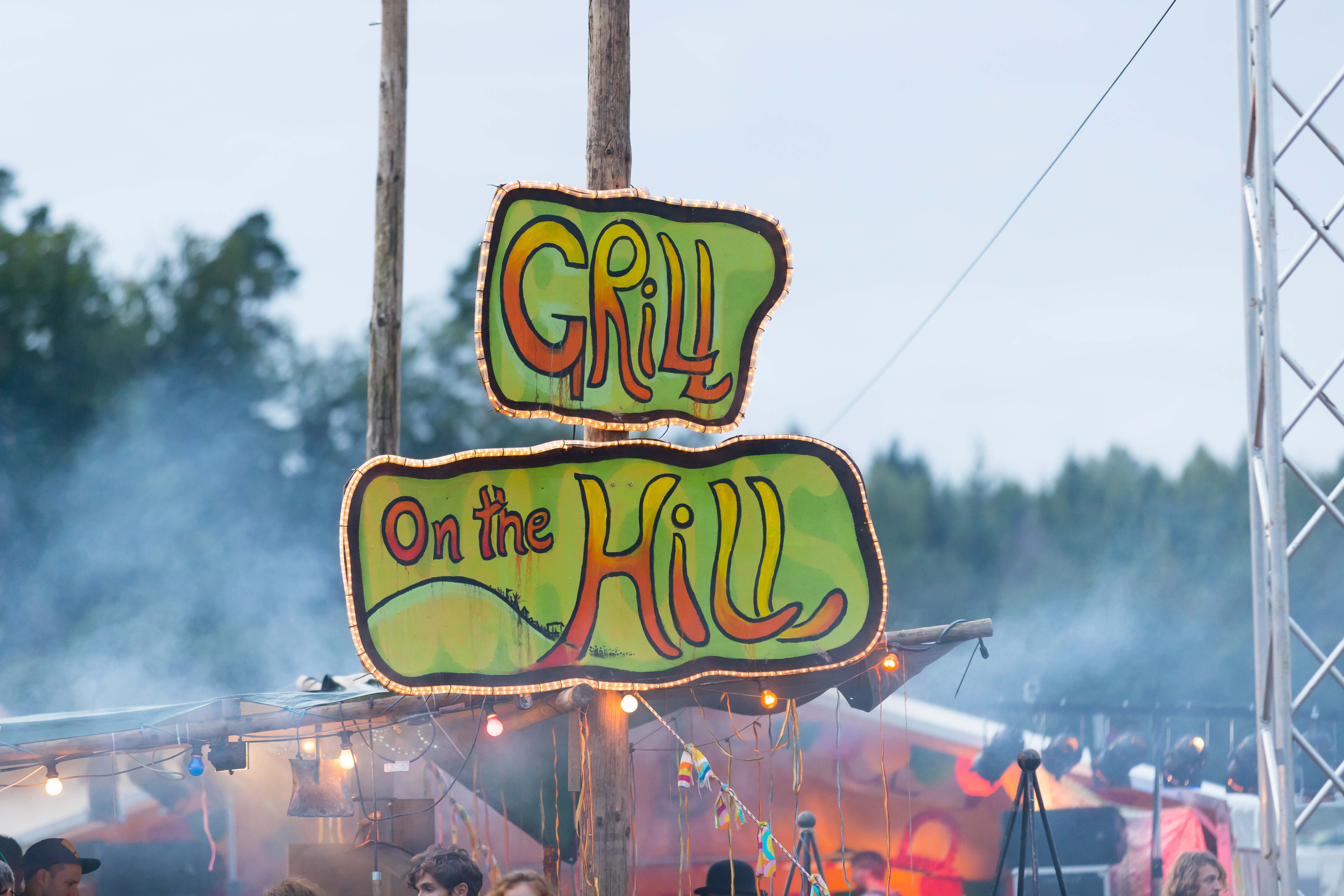 Festivalgelände during Burg Herzberg Festival at Hessen, Breitenbach am Herzberg, , Germany on 2017-07-28, Photo: Sven Mandel